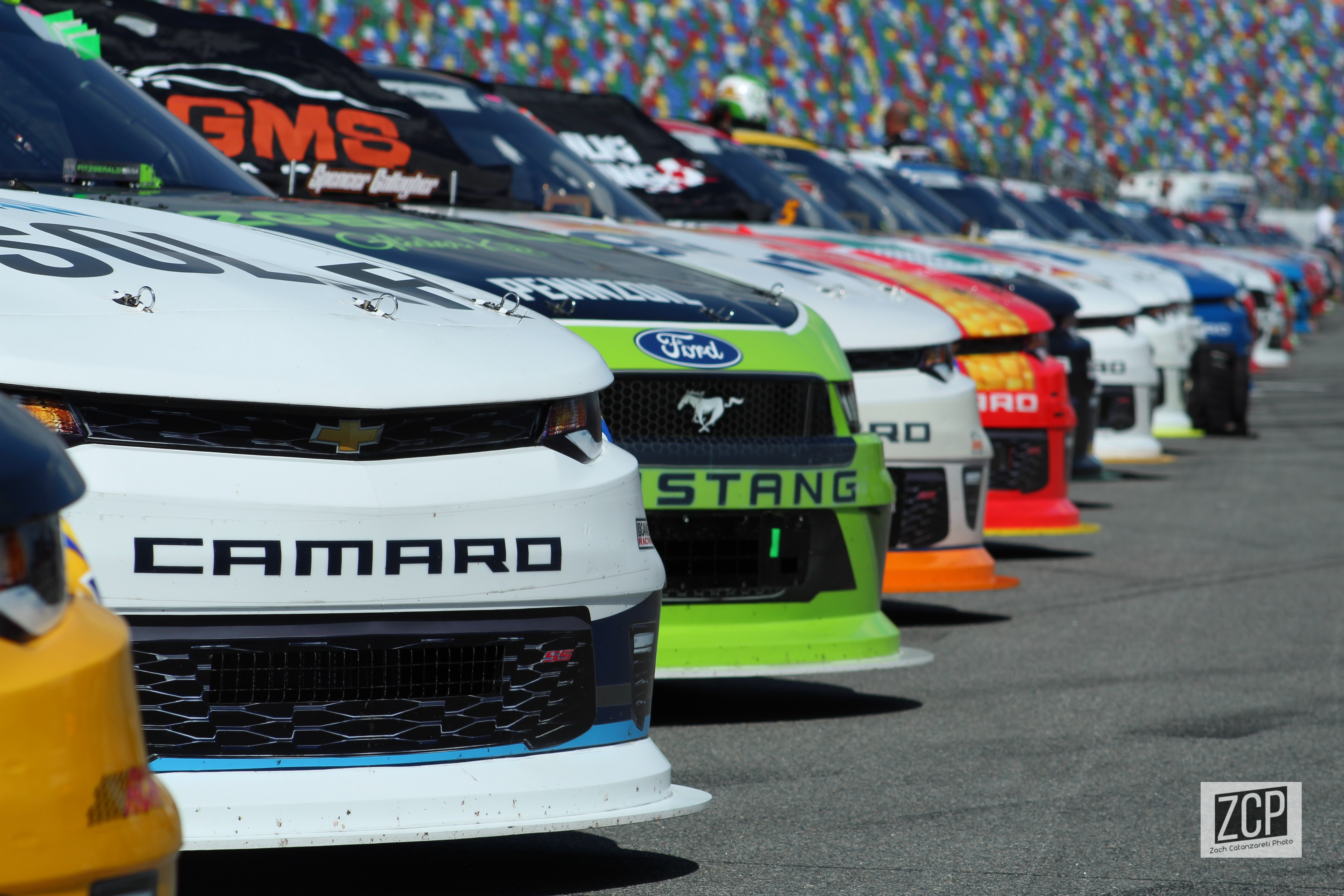 2018 Daytona 500